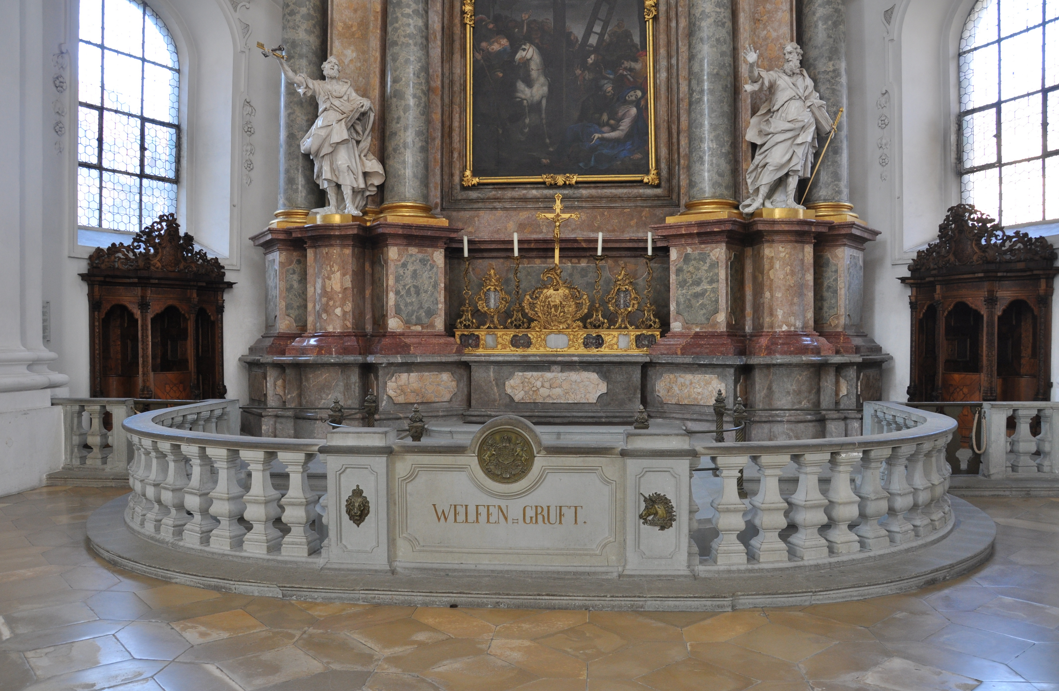 Weingarten (Württemberg) , Basilika St. Martin und Oswald